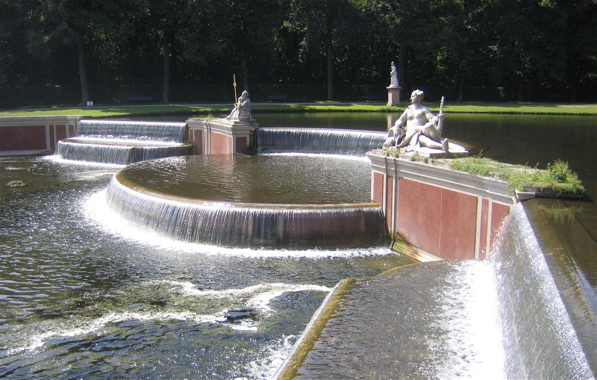 Schlosspark Nymphenburg, Große Kaskade